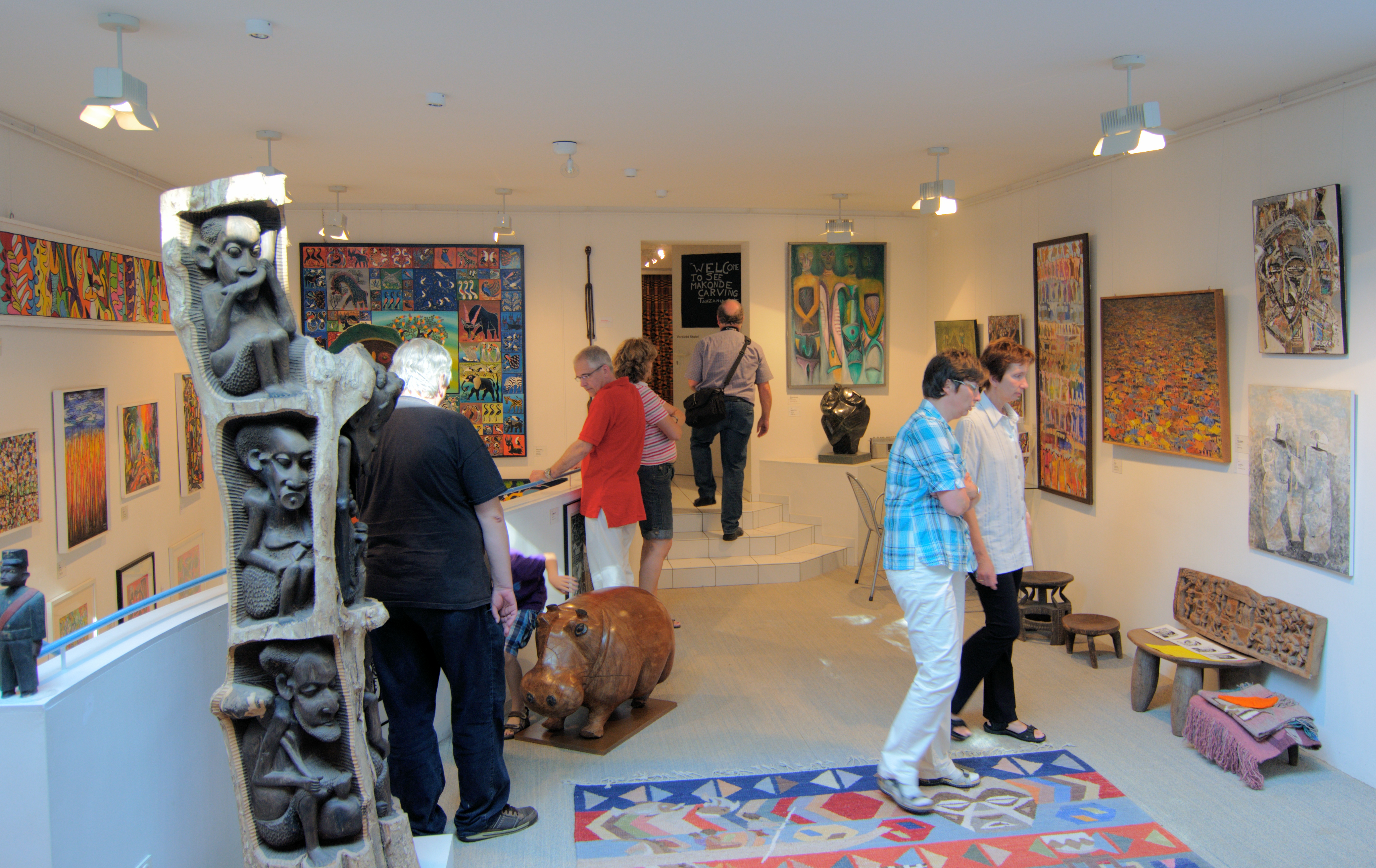 Afrika-Haus Freiberg, Innenraum